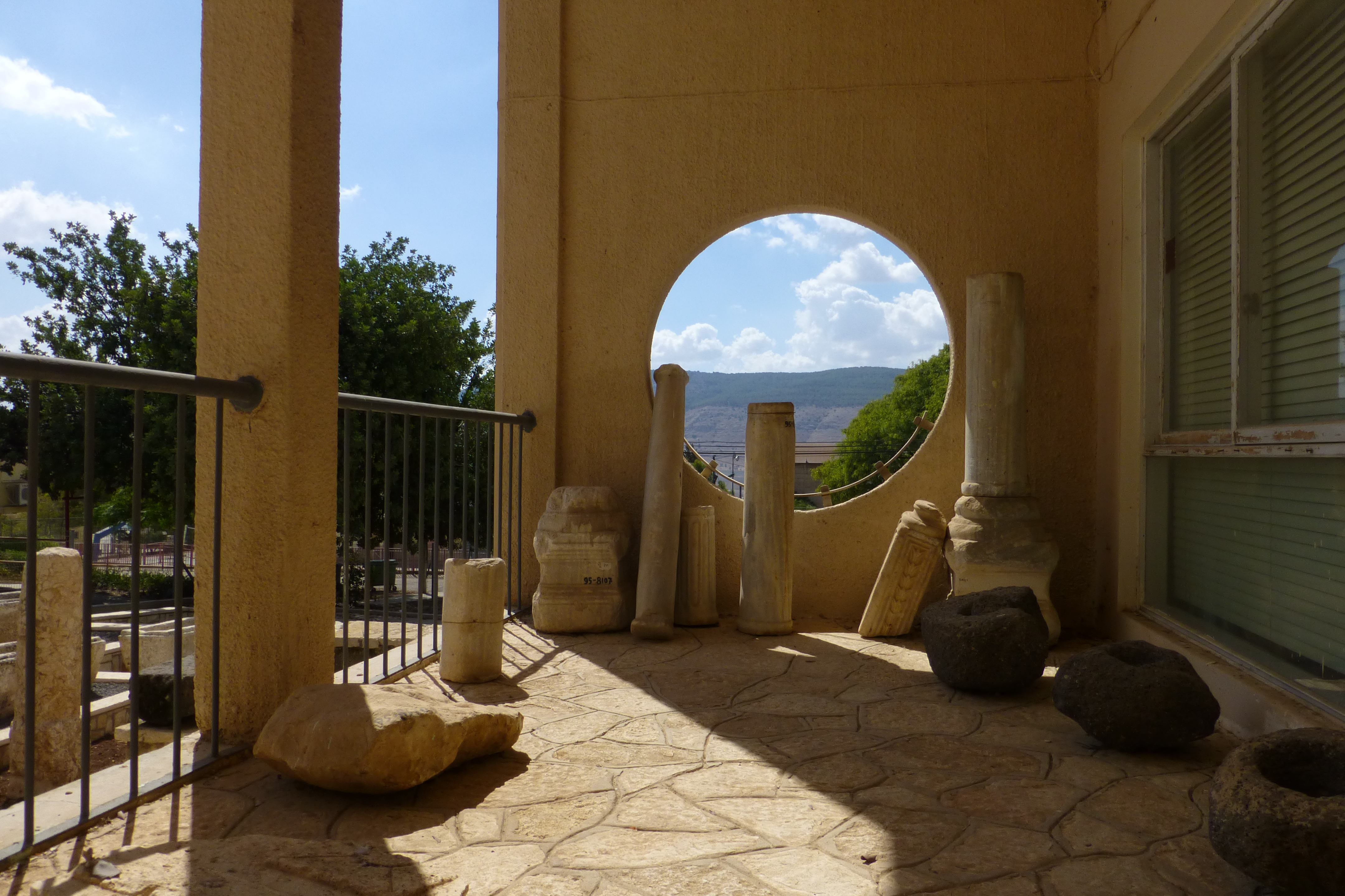 מוזיאון בית שטורמן המצוי בקיבוץ עין חרוד מאוחד נוסד בשנת 1941 על ידי חבר הקיבוץ שמואל סבוראי כמוזיאון לטבע.